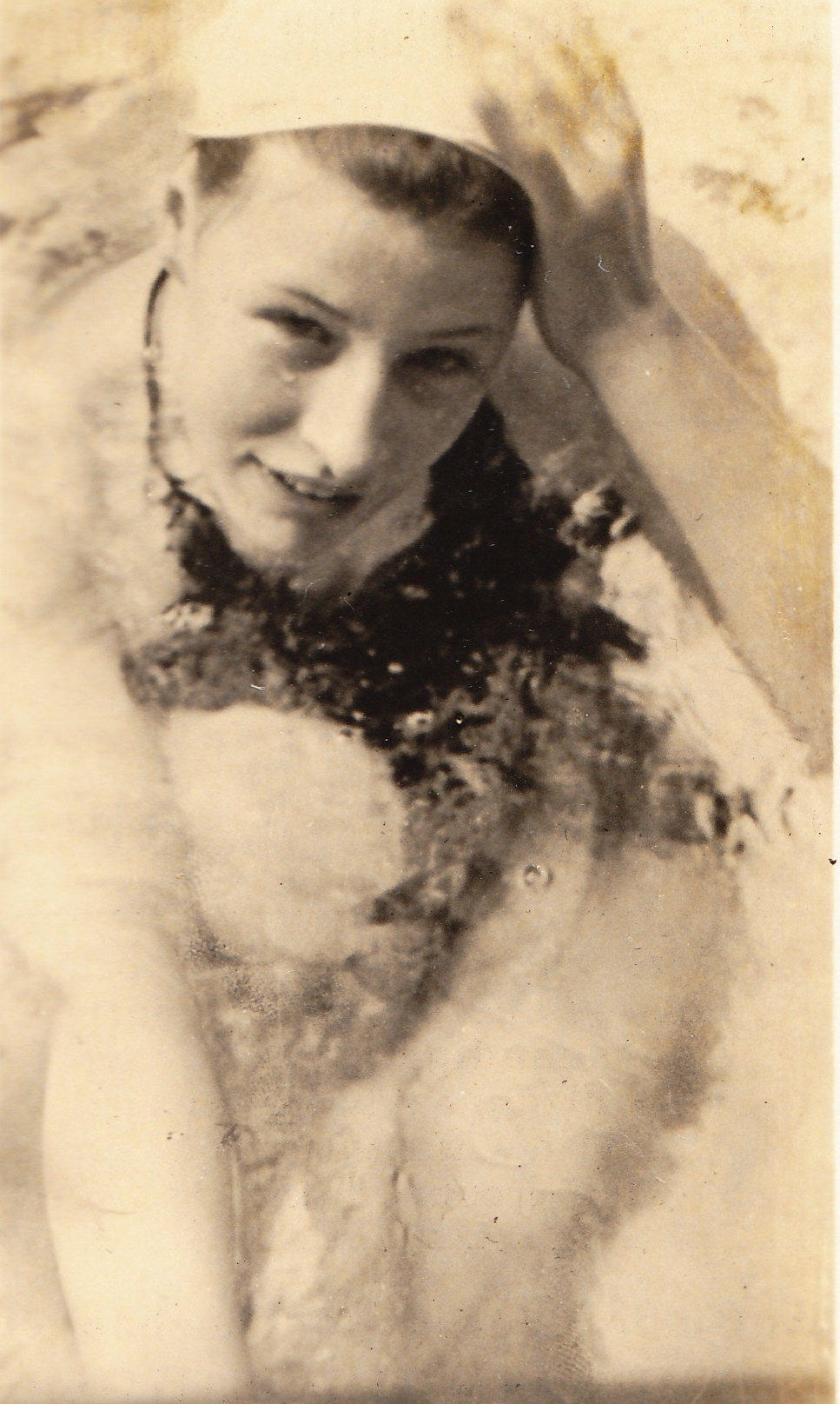 Riet van Veen in haar element.